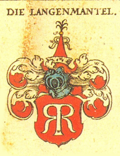 Stammwappen der Augsburger Patrizierfamilie Langmantel